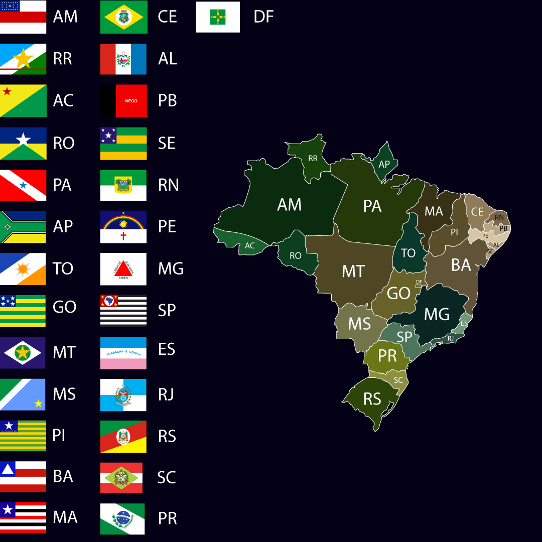 As 27 bandeiras das UFs brasileiras